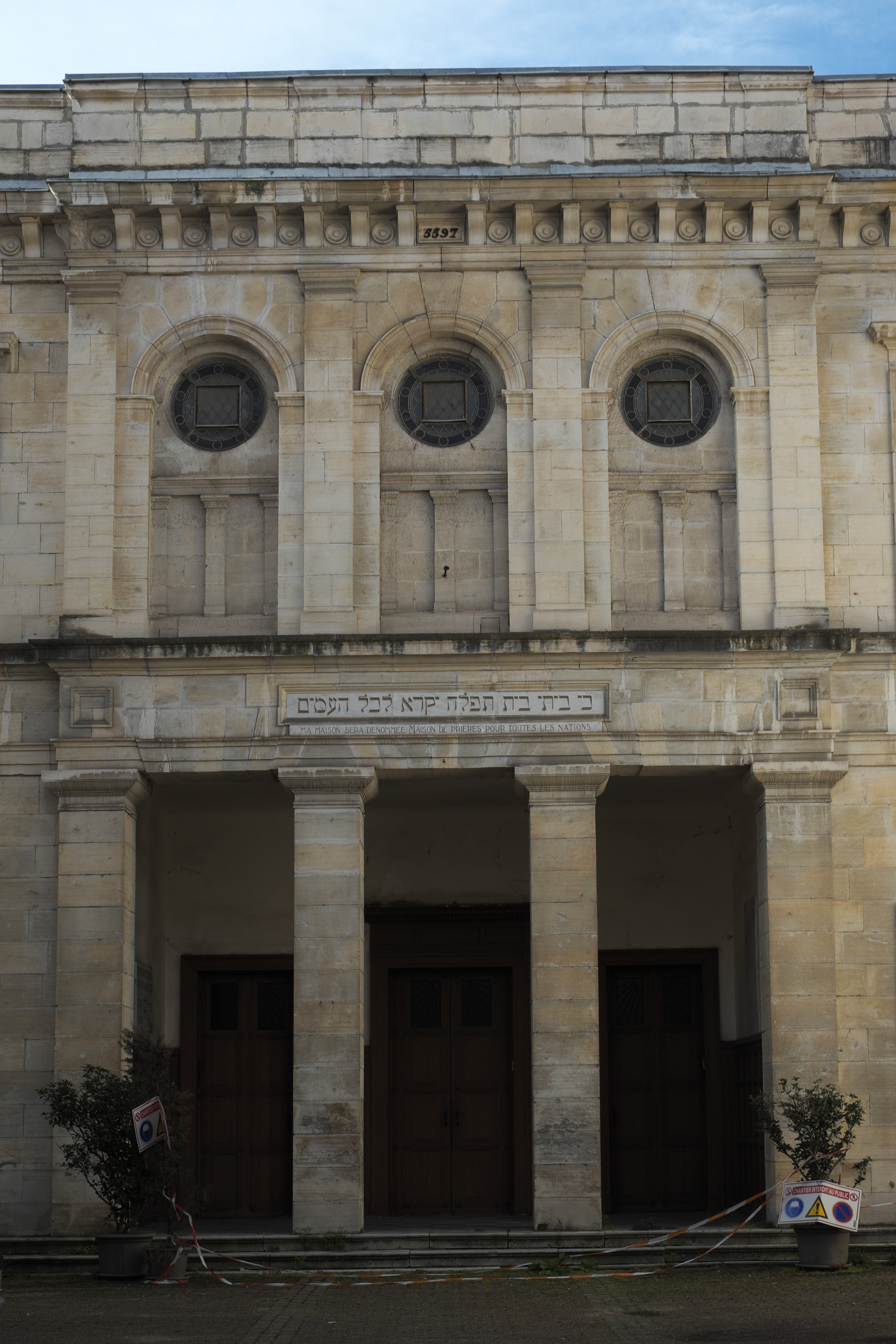 Synagoge in Bayonne im Département Pyrénées-Atlantiques (Region Aquitaine-Limousin-Poitou-Charentes/Frankreich)